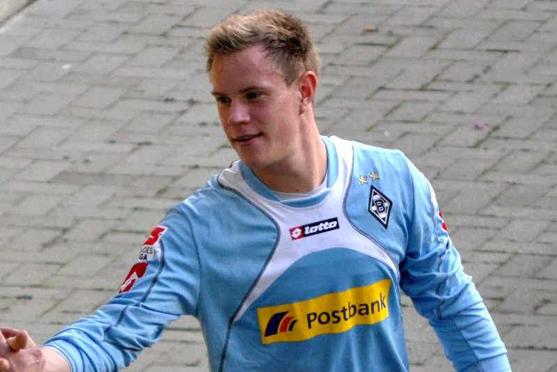 Ter Stegen nach dem Sieg gegen Hannover 96